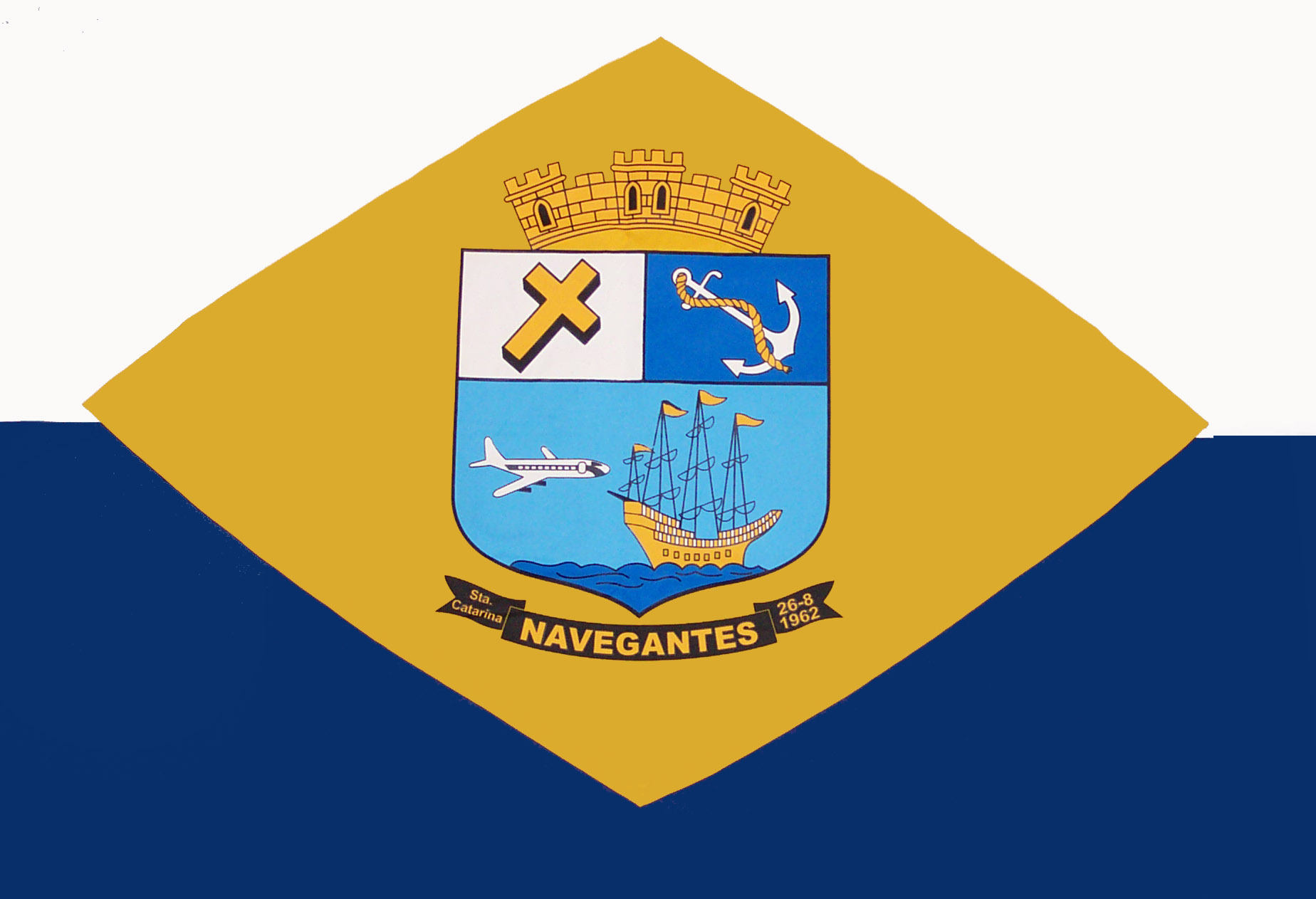 Drapeau de la municipalité de Navegantes - Brésil